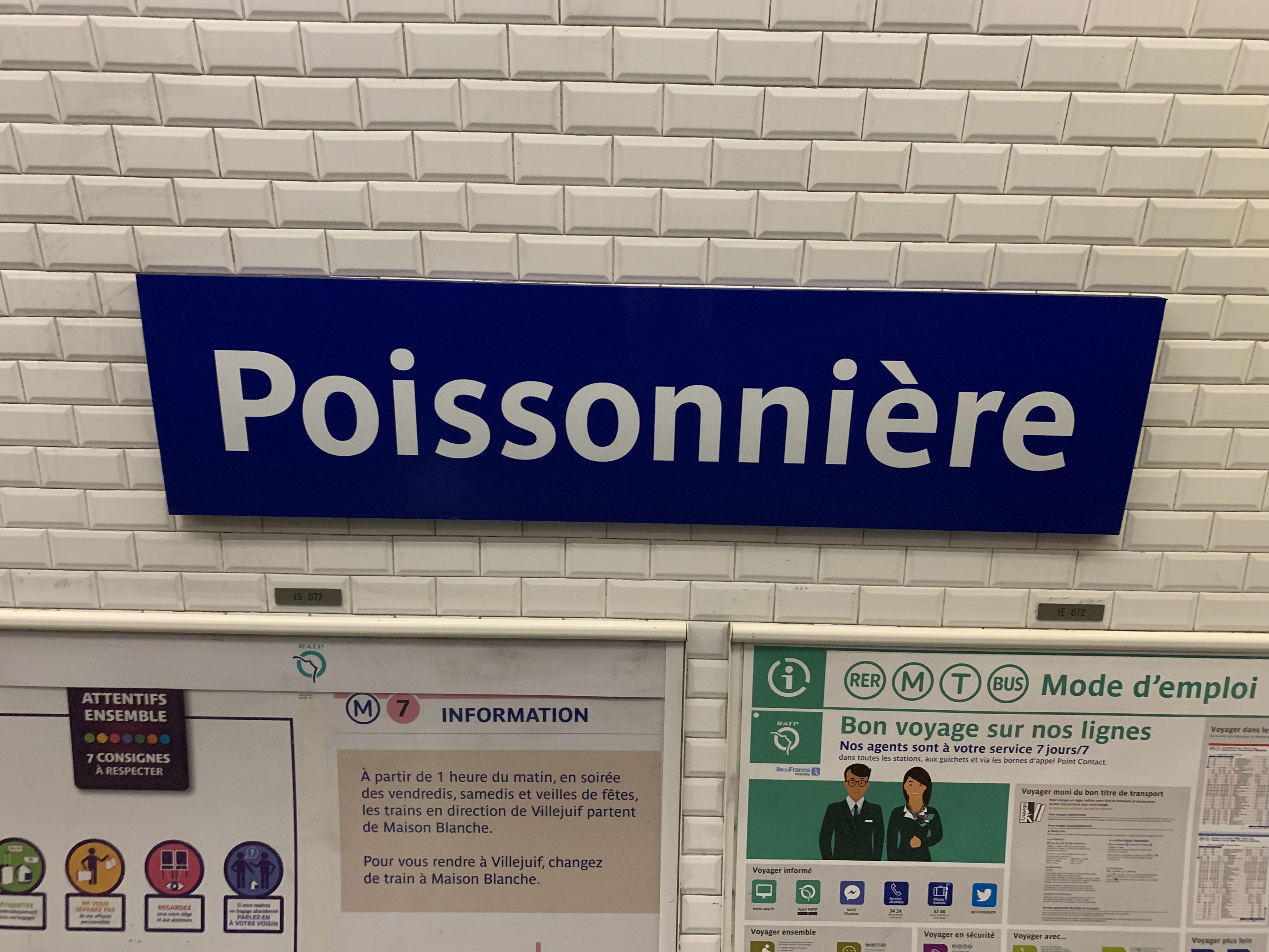 Station de métro Poissonnière, ligne 7, Paris.